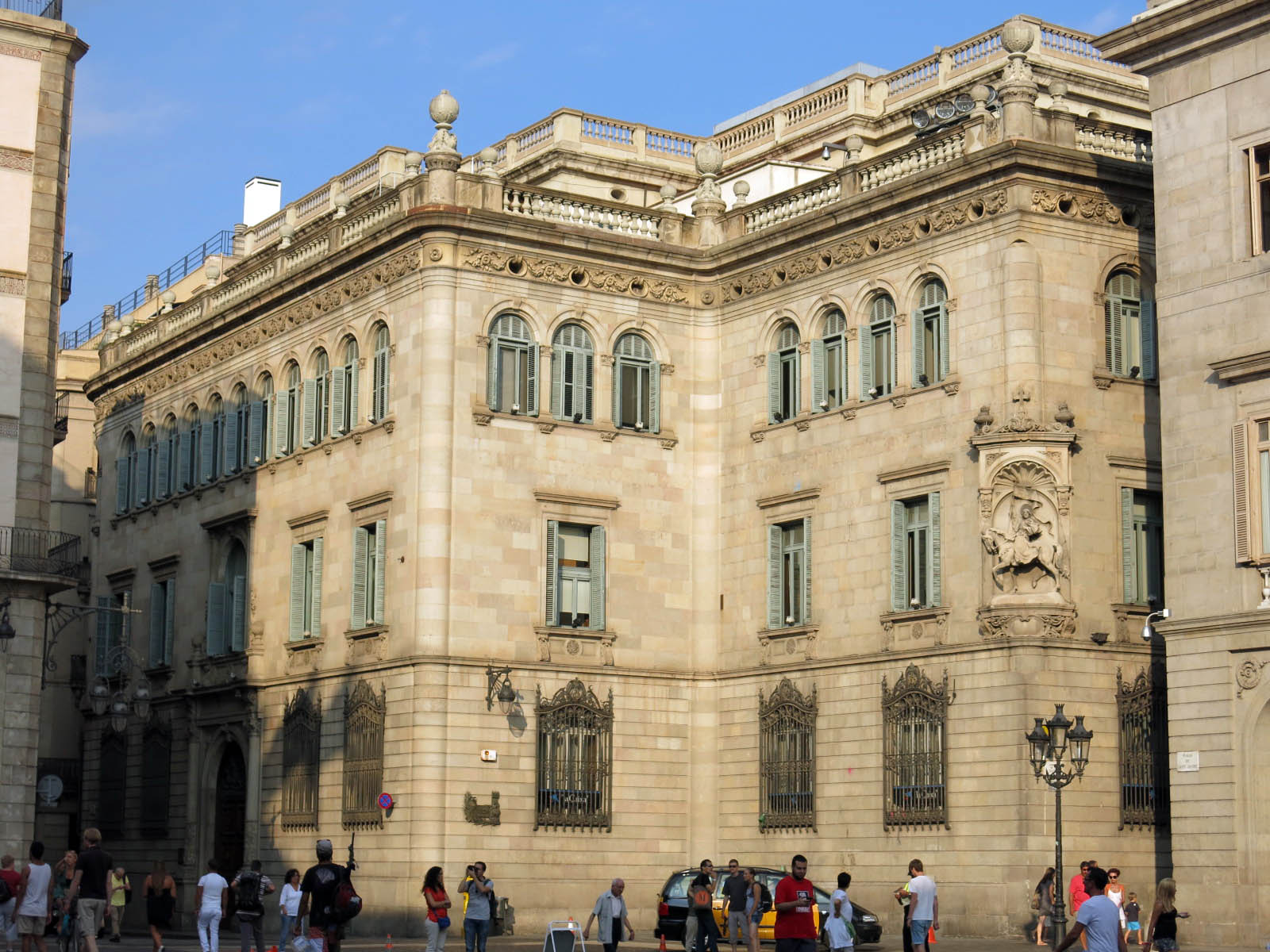 Caixa de Barcelona (Barcelona) Object location41° 22′ 58.26″ N, 2° 10′ 38.71″ E